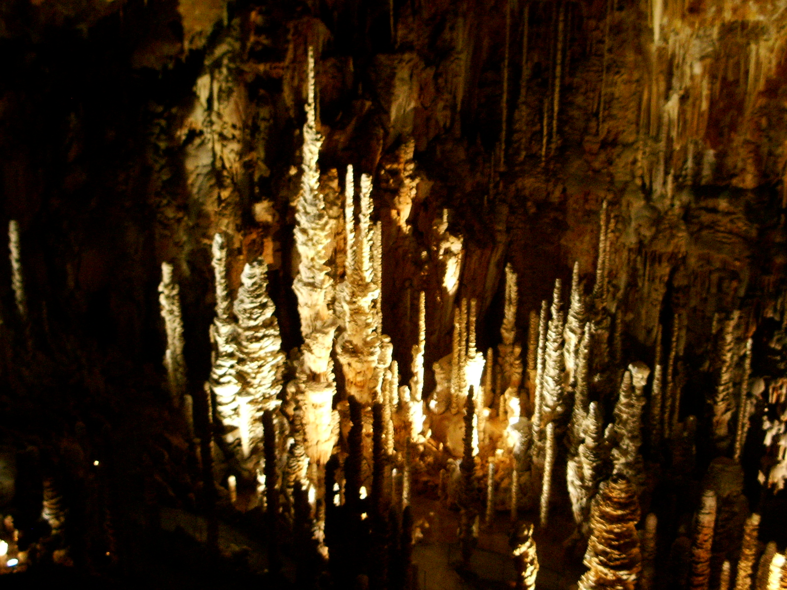 La forêt de stalagmites qui se situe en contrebas de la grande salle de l'aven armand (Hures-la-Parade - Lozère).